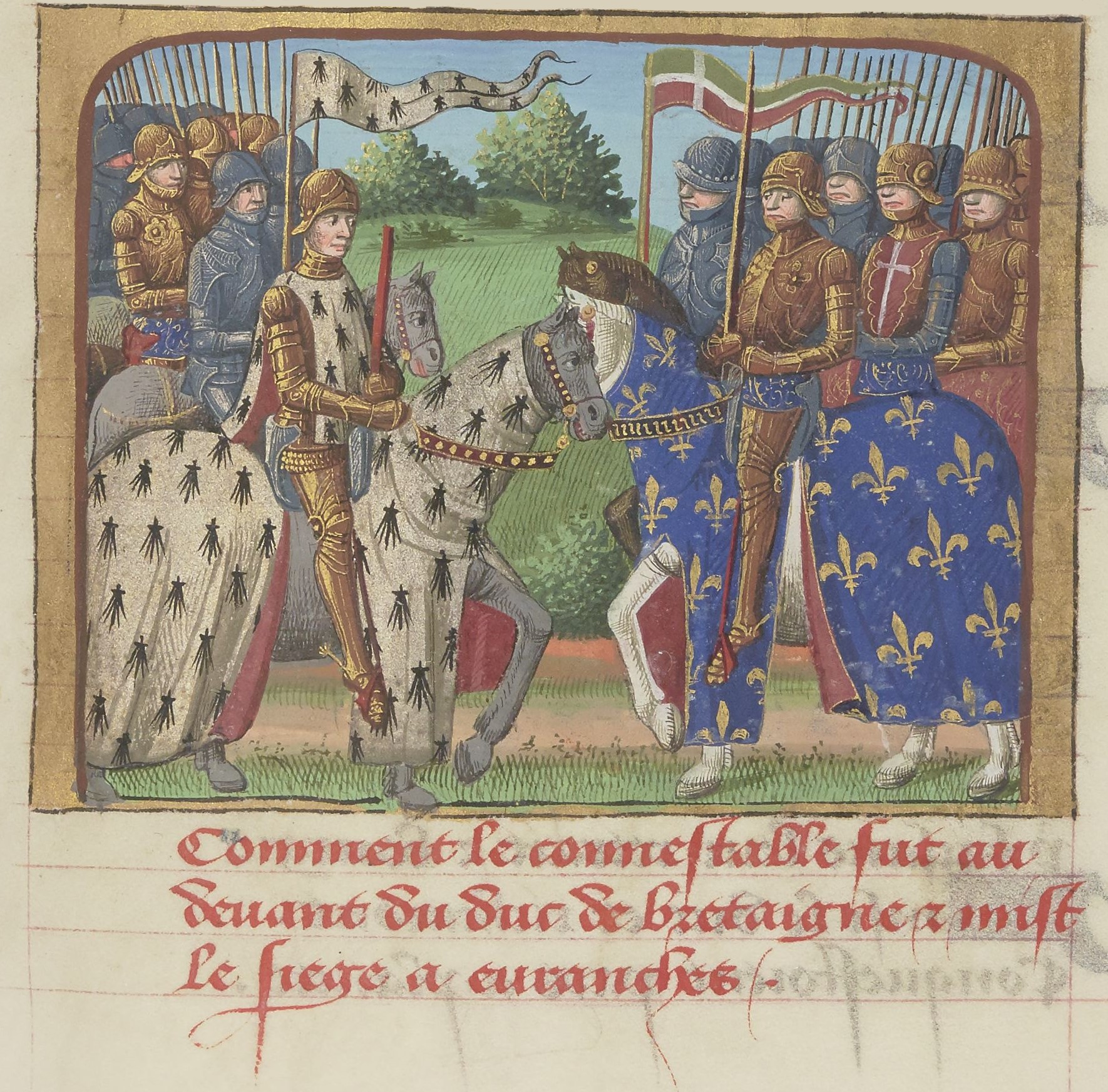 Le duc de Bretagne François I° et le connétable Arthur III de Richemont, par Martial d'Auvergne, enluminure issue de l'ouvrage Vigiles de Charles VII, Paris, France, XV°siècle.